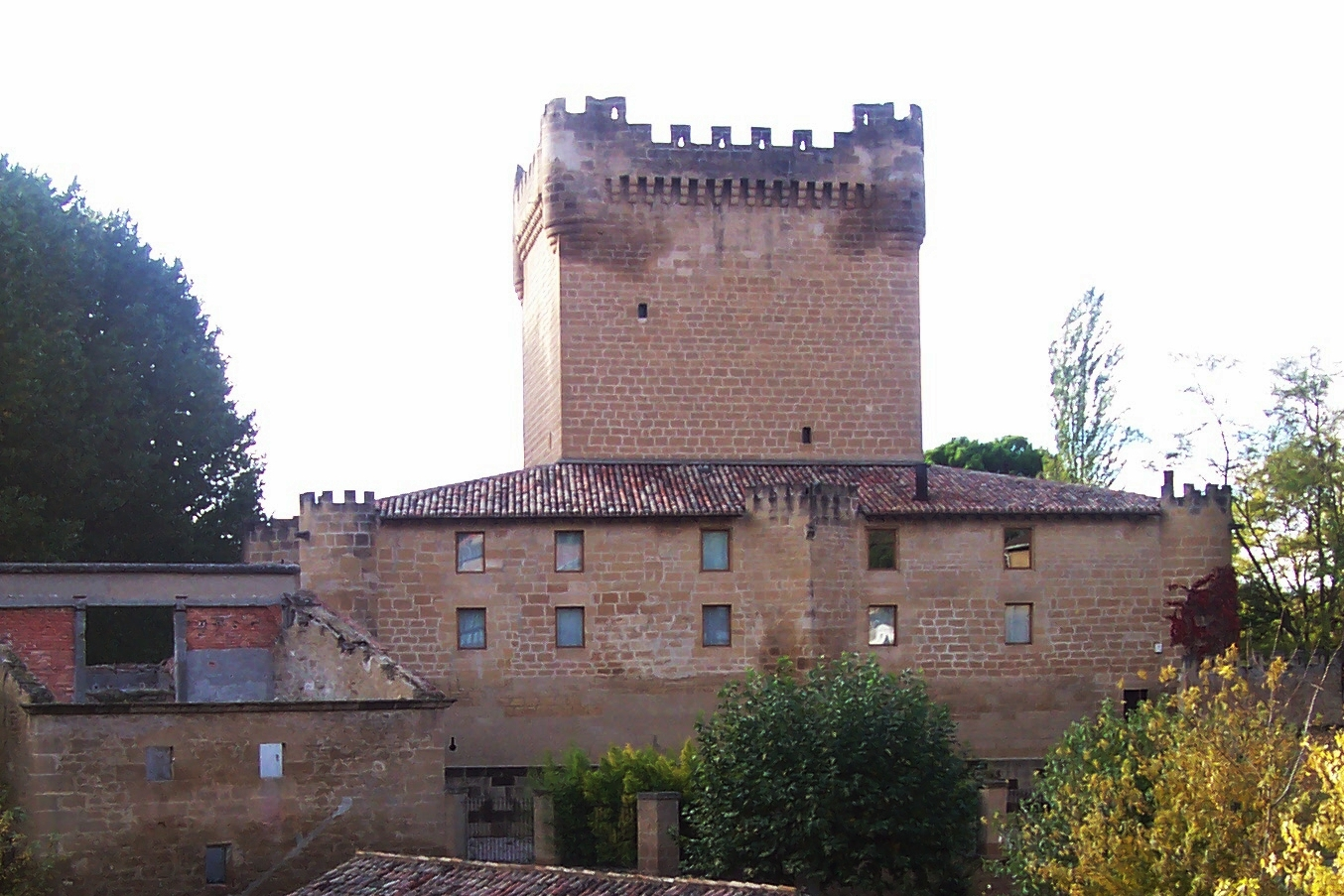 Castillo de los Velasco en Cuzcurrita de Río Tirón, La Rioja (España).